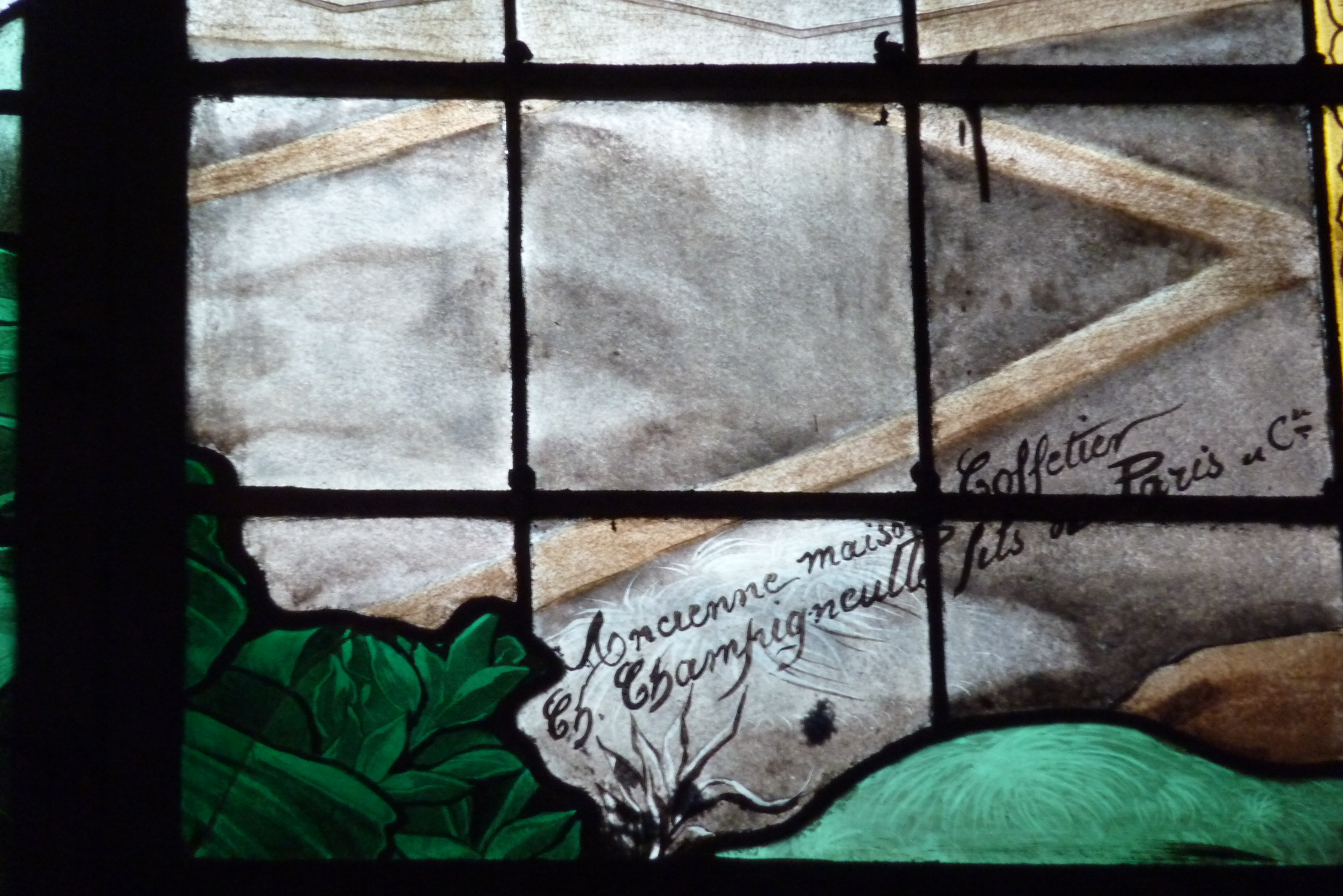 Katholische Pfarrkirche Saint-Louis-en-l'Île in Paris, Detail eines Glasfensters mit der Signatur: "Ancienne maison Coffetier Ch. Champigneulle fils de Paris et Cie"